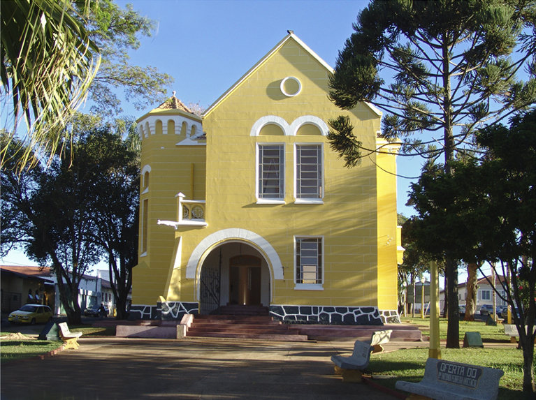 Memorial Pascoal Bocci Avaré